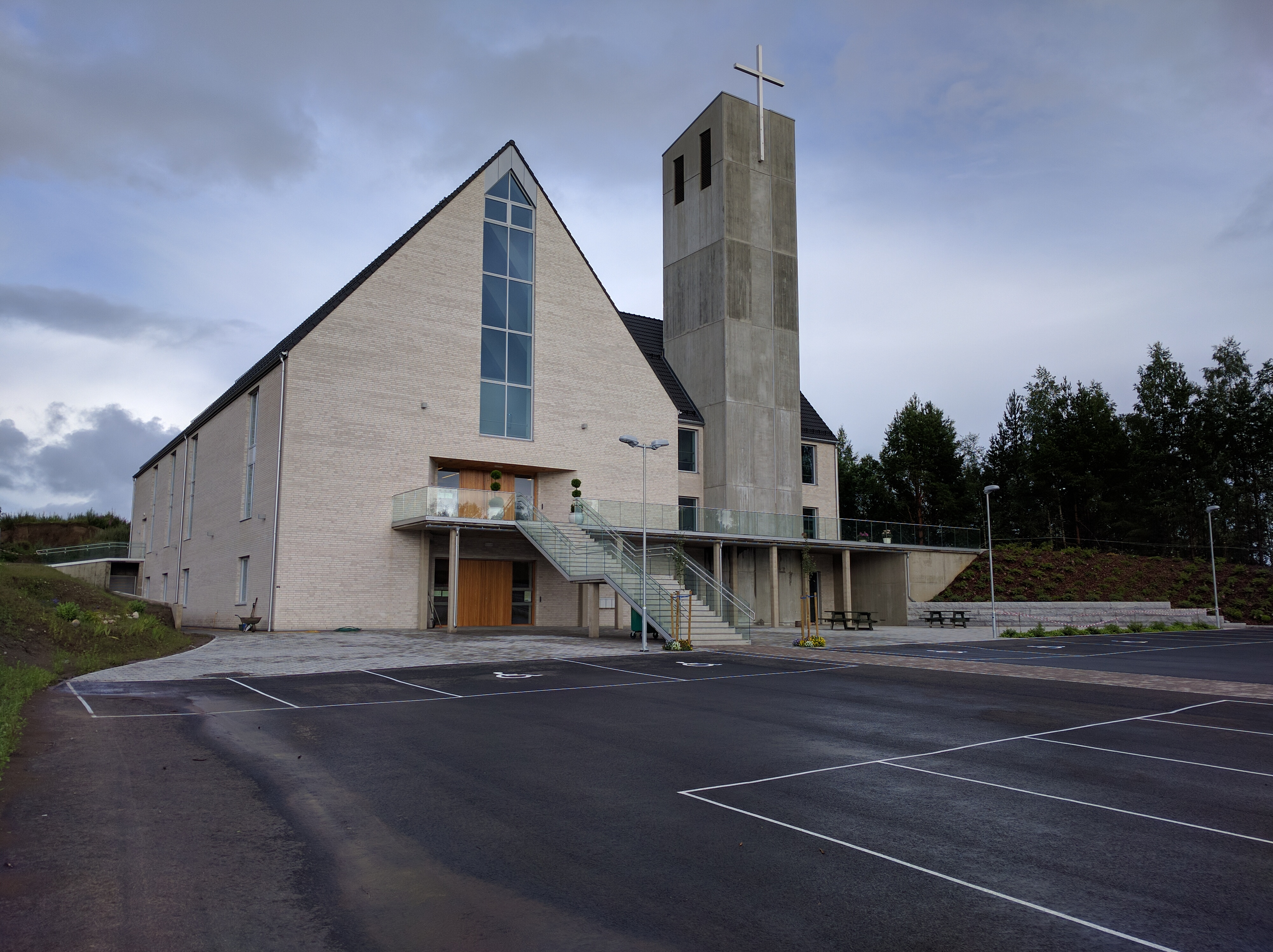 St. Gudmund katolske kirke på Jessheim